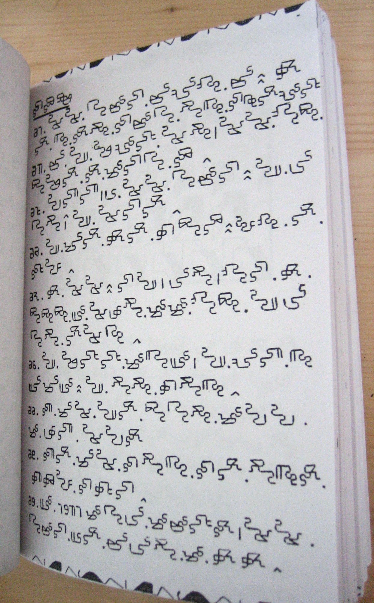 Exemple de Mandombe du Manuel de Lecture aux apprenants de l'écriture négro-africaine. Sample page of the Reading Manual for Learners of Mandombe.